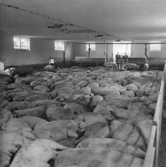 Markkleeberg, Blick in einen Laufstall Zentralbild Koch 8.7.1960 8. Landwirtschaftsausstellung in Markkleeberg. Nutzung von Altbauten für die buchtenlose Schweinehaltung. Durch den Umbau von Altbauten können in einem Stall der früher 250 Schweine beherbergte, 500 Schweine untergebracht werden. Die Tiere werden mit Vakuumfütterungsautomaten gehalten. Dieses Verfahren bringt eine wesentliche Verbesserung der Arbeitsproduktivität mit sich. In Großanlagen mit einer entsprechend mechanisierten Futteraufbereitung kann eine Arbeitskraft mehr als 2000 Schweine betreuen. UBz: Blick in den buchtenlosen Schweinestall.